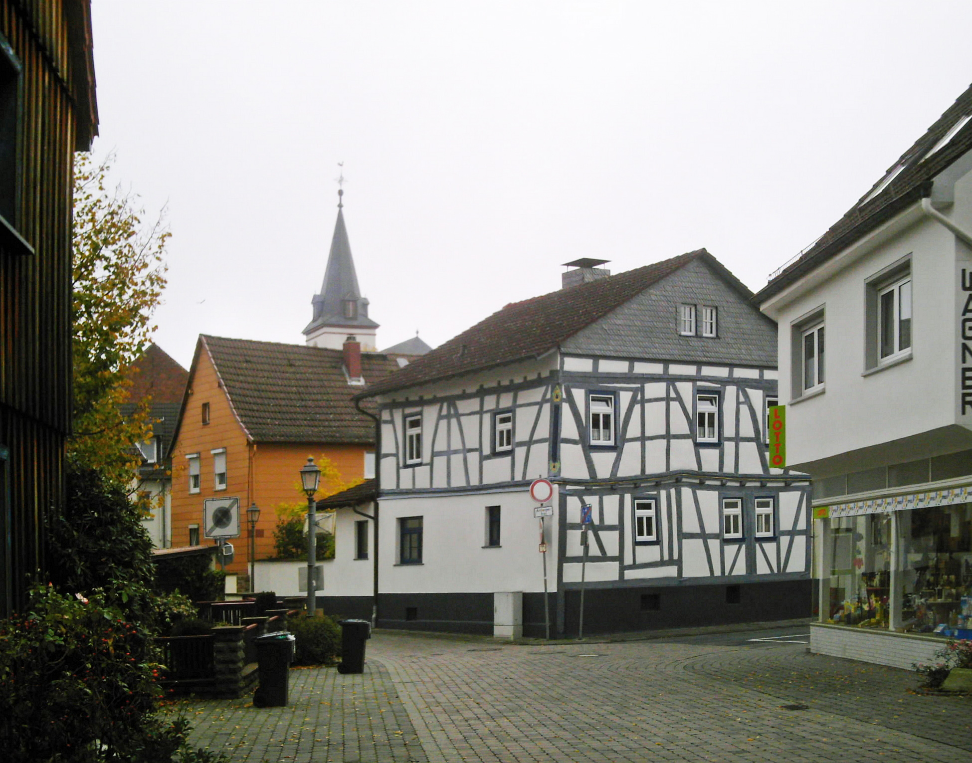 Altwehrheim